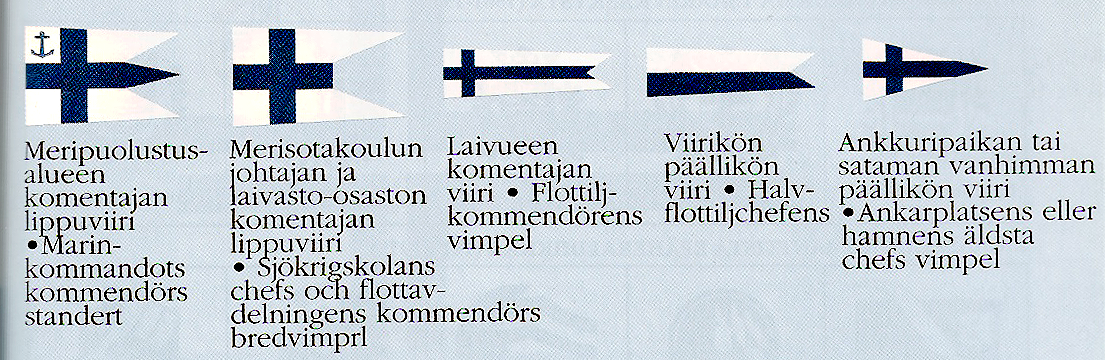 Finnish Navy banners